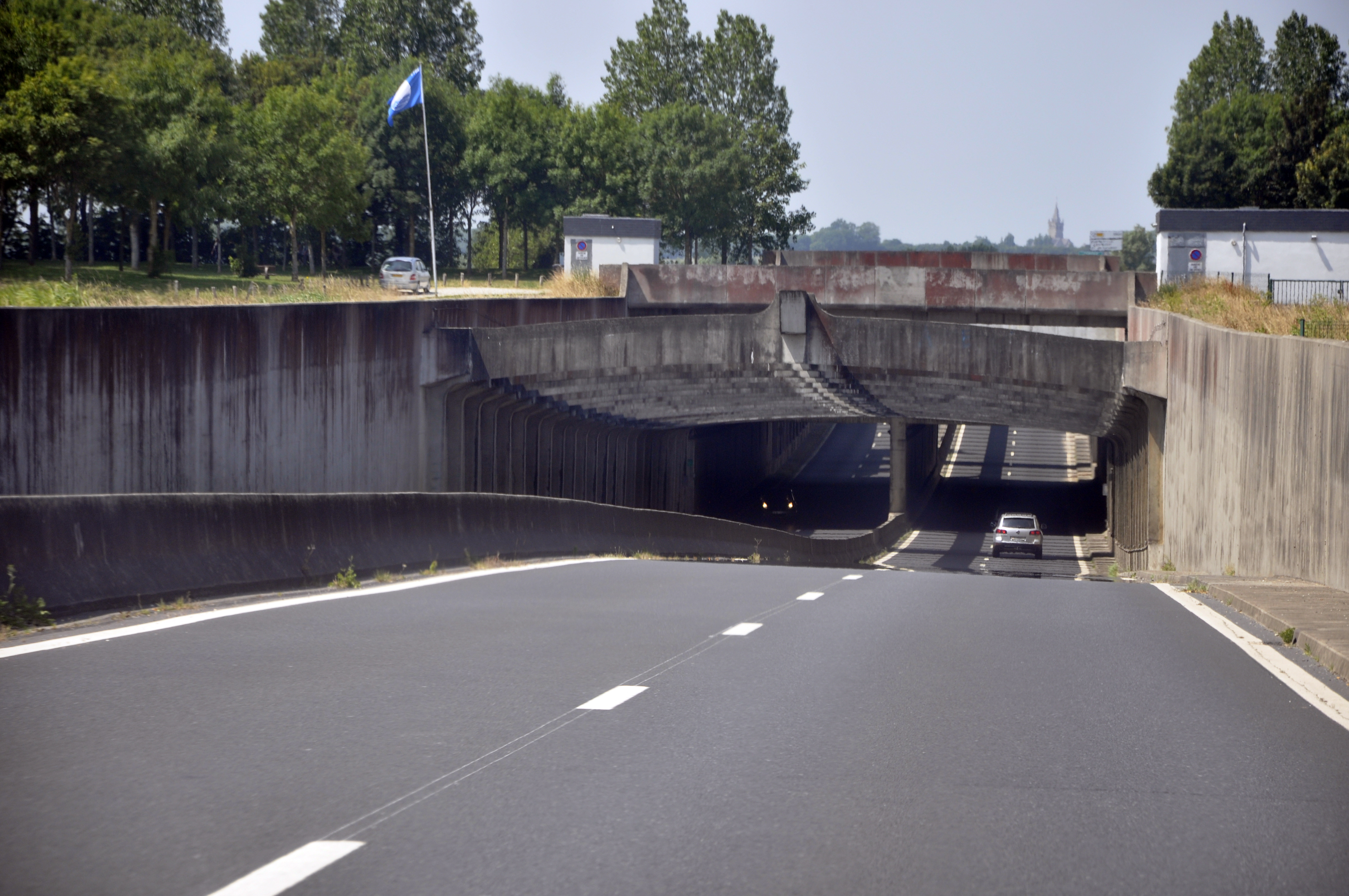 pont canal de Carentan vu depuis la RN13 dans le sens Caen-Cherbourg